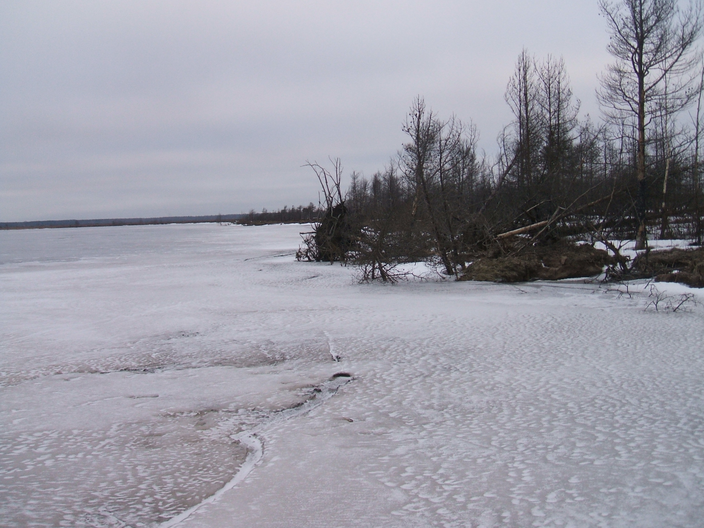 Берег Сестрорецкого Разлива и Сестрорецкого болота